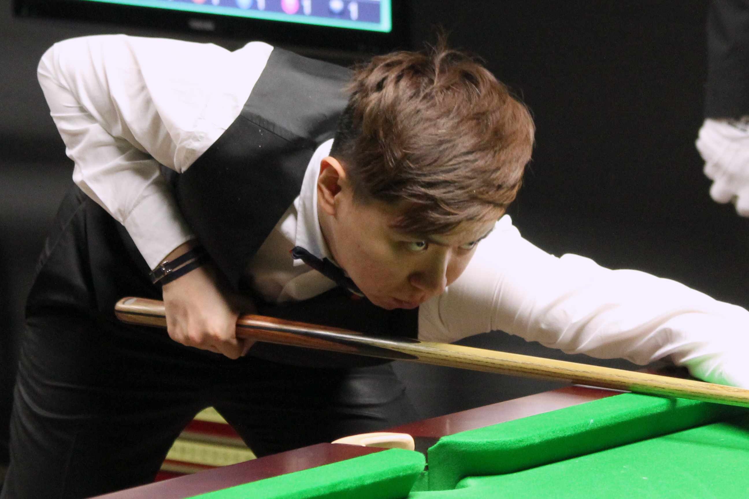 Xiao Guodong beim Paul Hunter Classic 2016